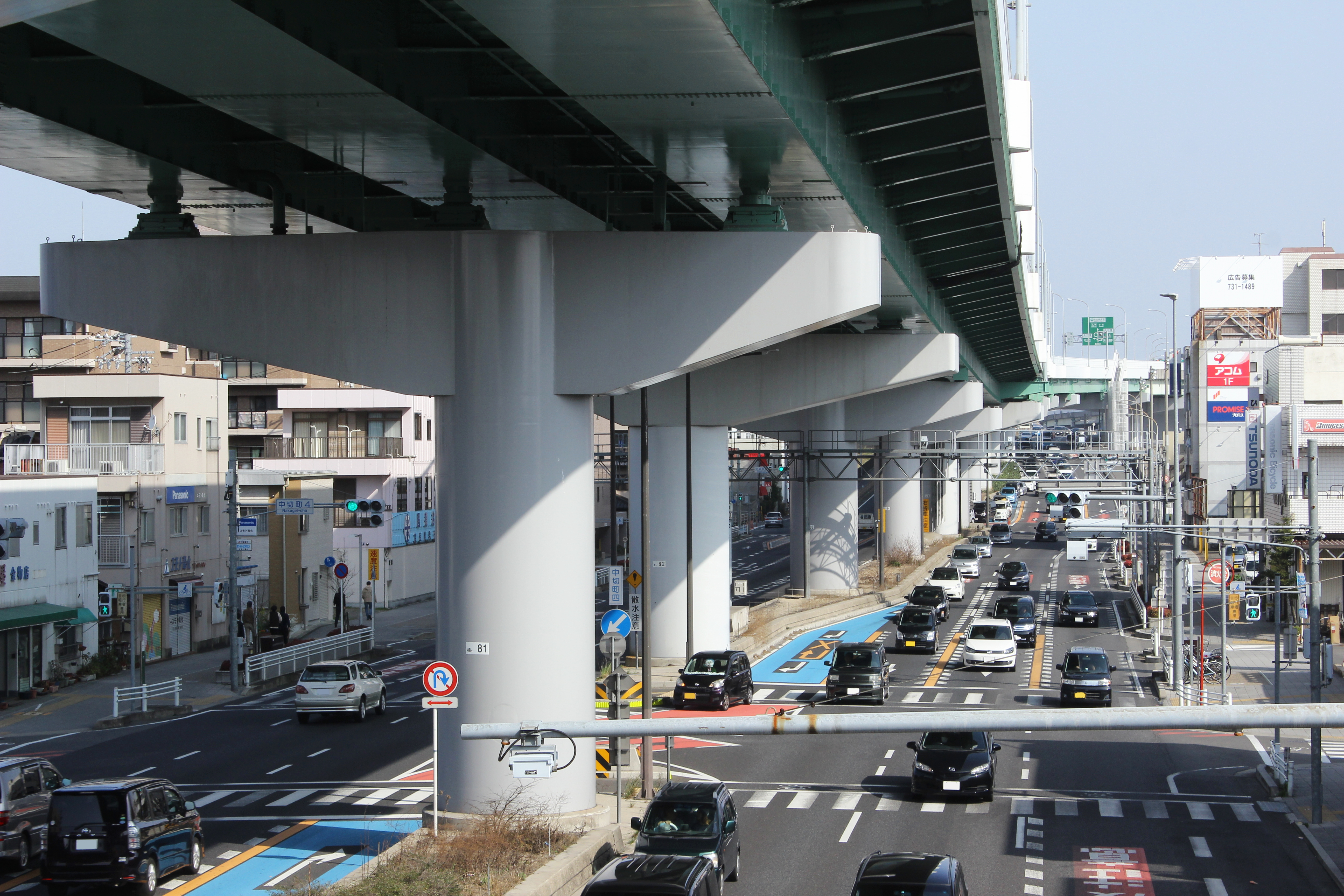 国道41号（名古屋市北区内）と名古屋高速1号楠線